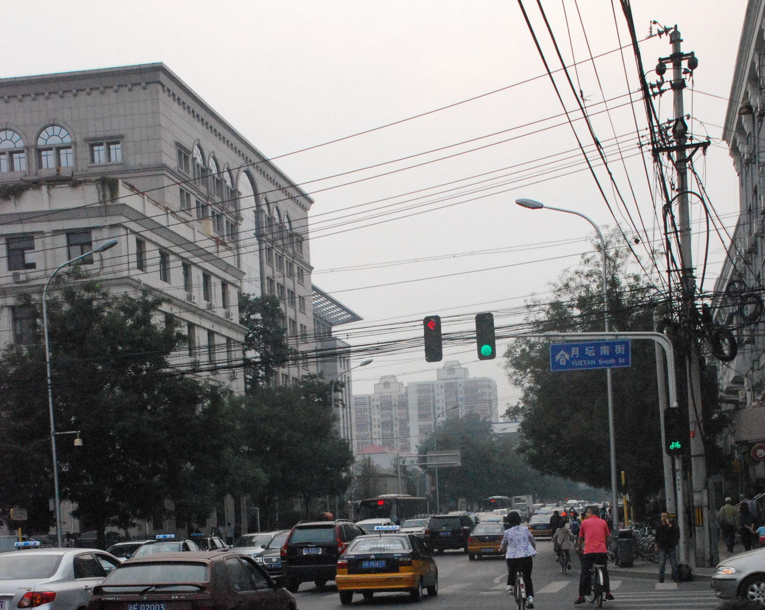 月坛南街